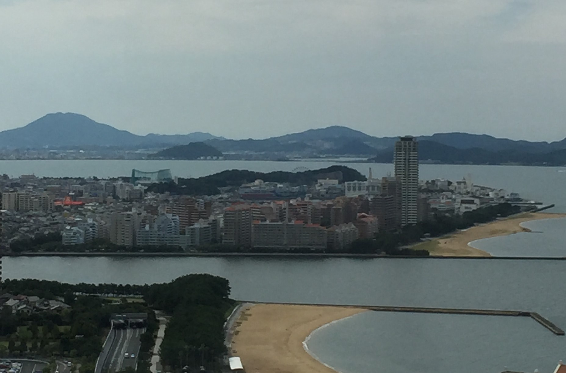 西福岡マリナタウン